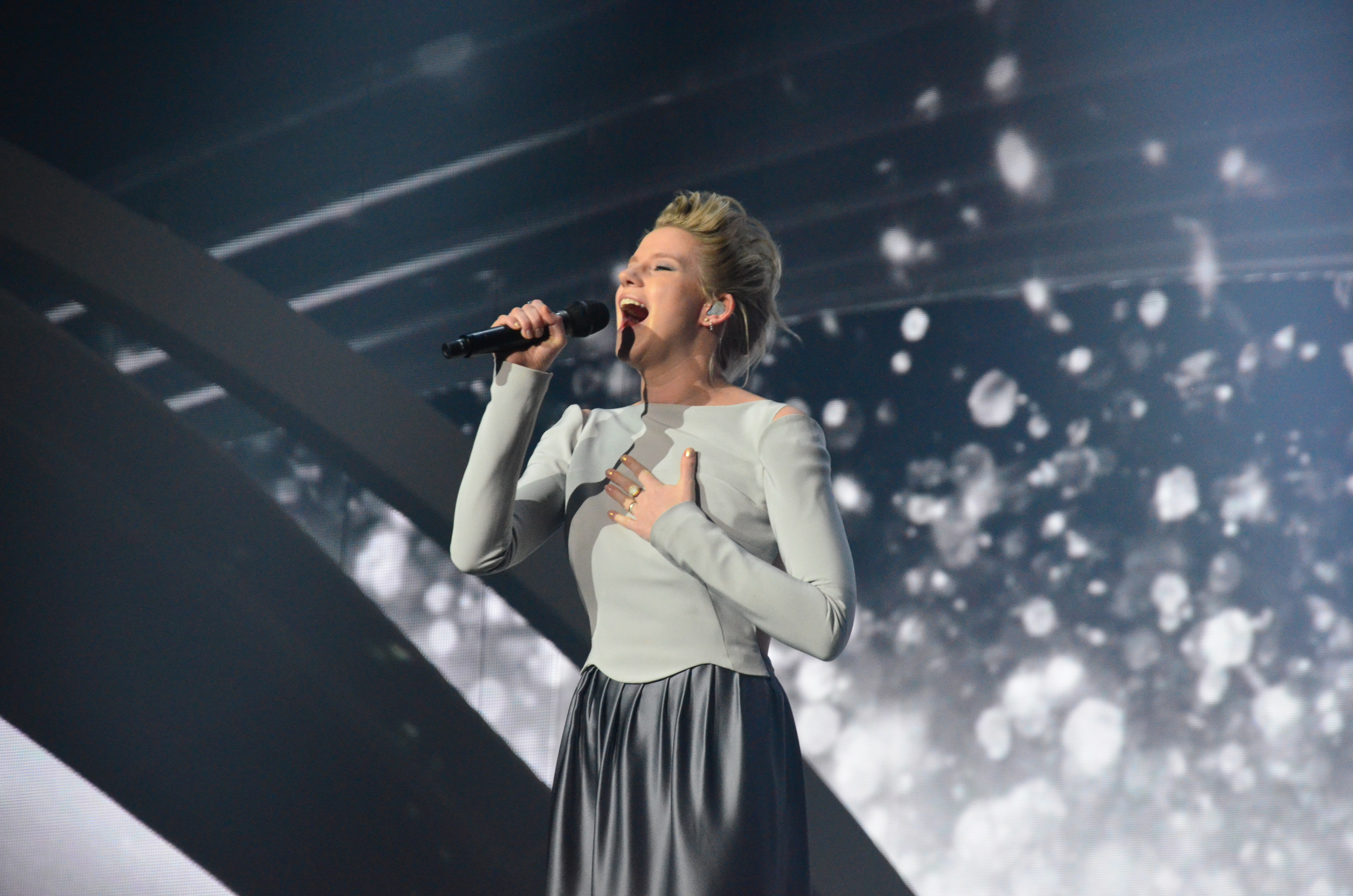 10 травня 2017 року у Києві відбулась генеральна репетиція 2 півфіналу "Євробачення".